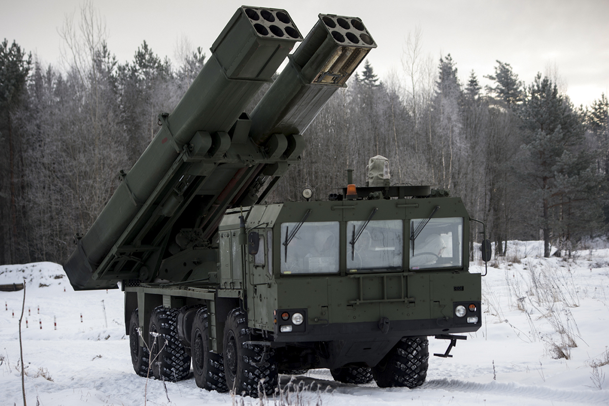 Ураган-1М - Тренировка курсантов Михайловской военной артиллерийской академии в стрельбе из артиллерийских орудий и вождении военной техники